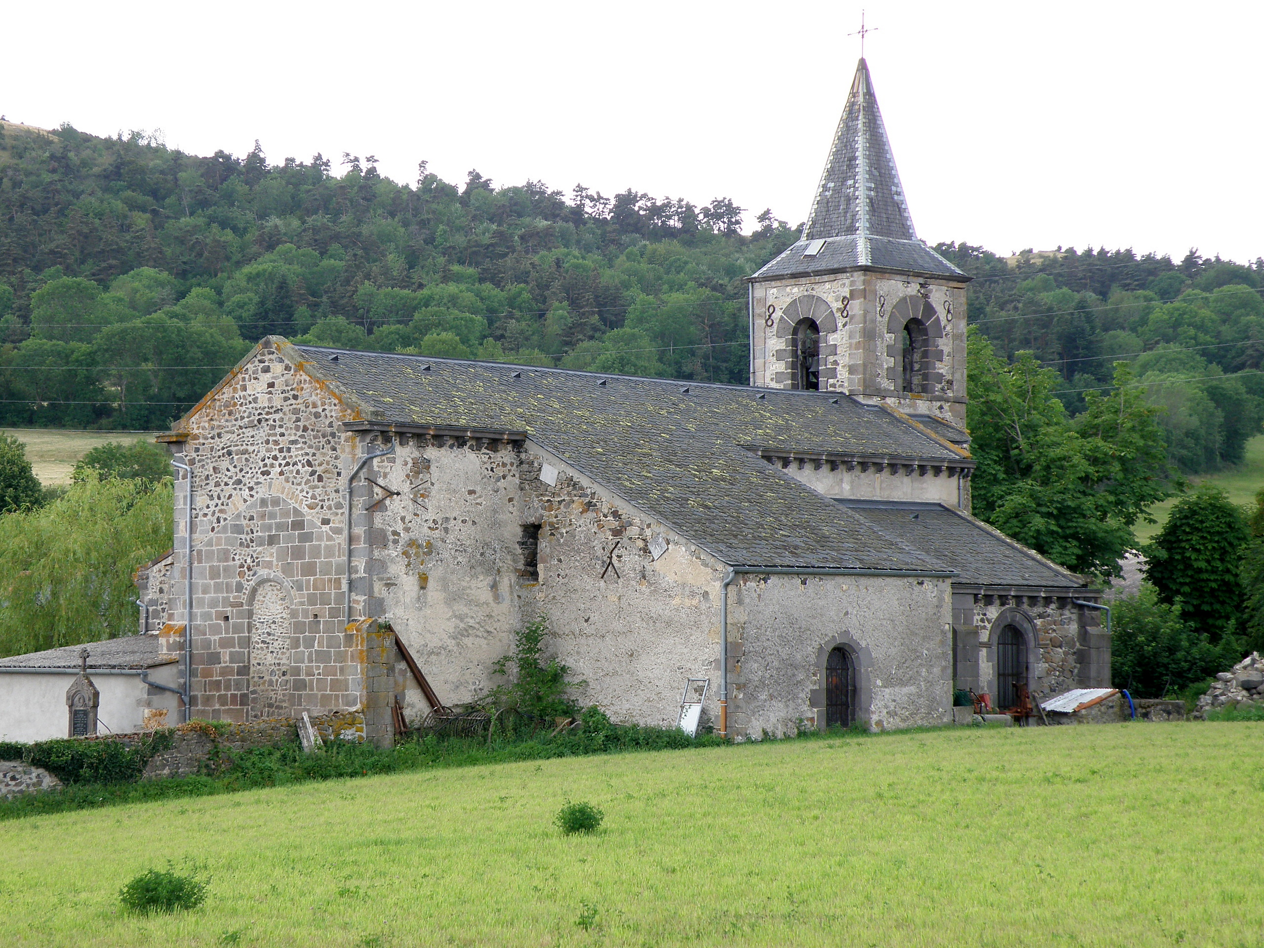 Olloix, comm. du Puy-de-Dôme (France, région Auvergne). Église.